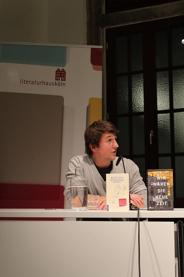 Der Autor und Literaturvermittler Tilman Strasser, 14. Februar 2017, Literaturhaus Köln